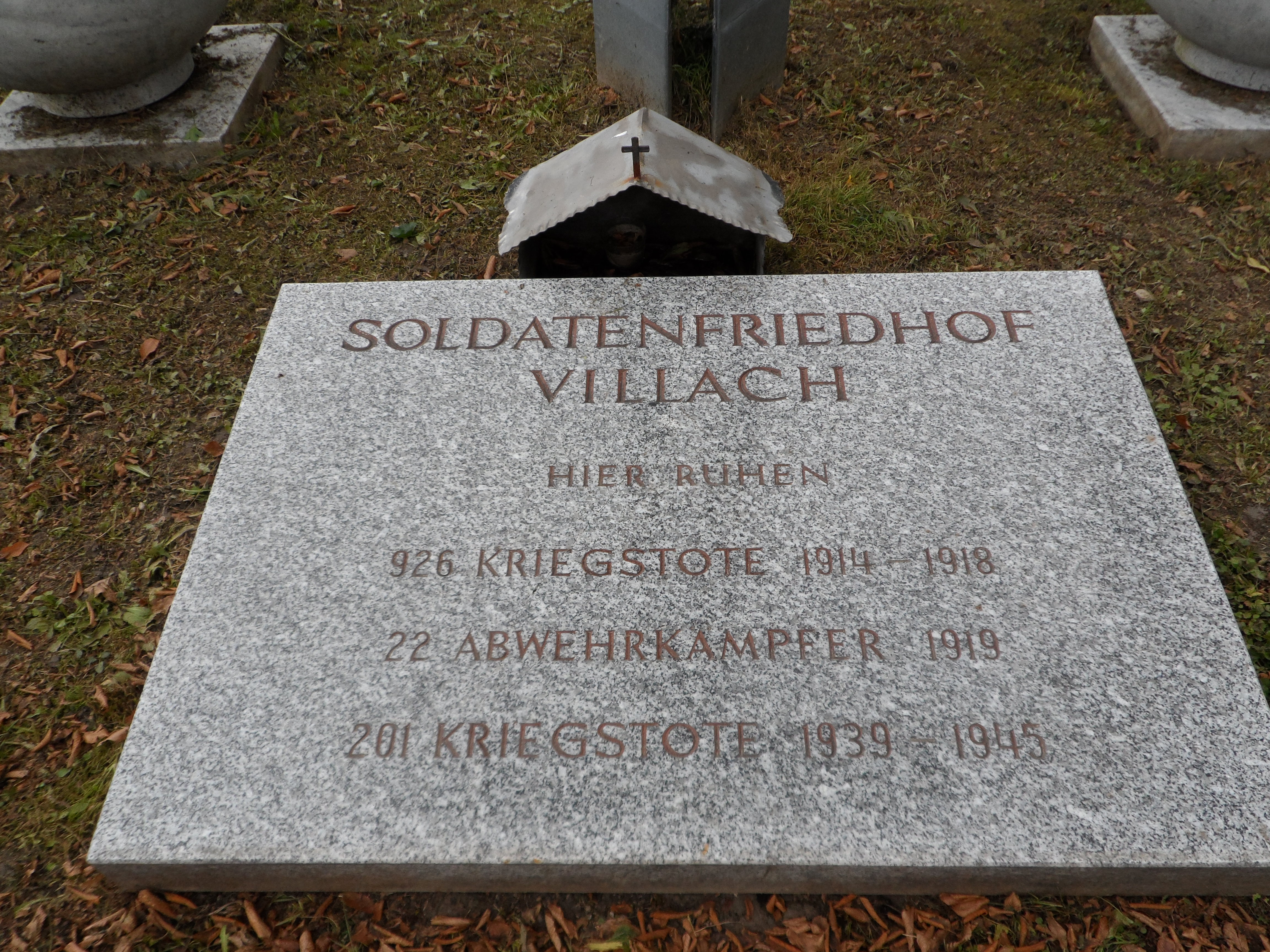 Gedenplatte mit Opferzahlen vom Soldatenfriedhof Villach, Zentralfriedhof Villach